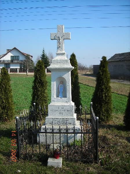 Dziecinów